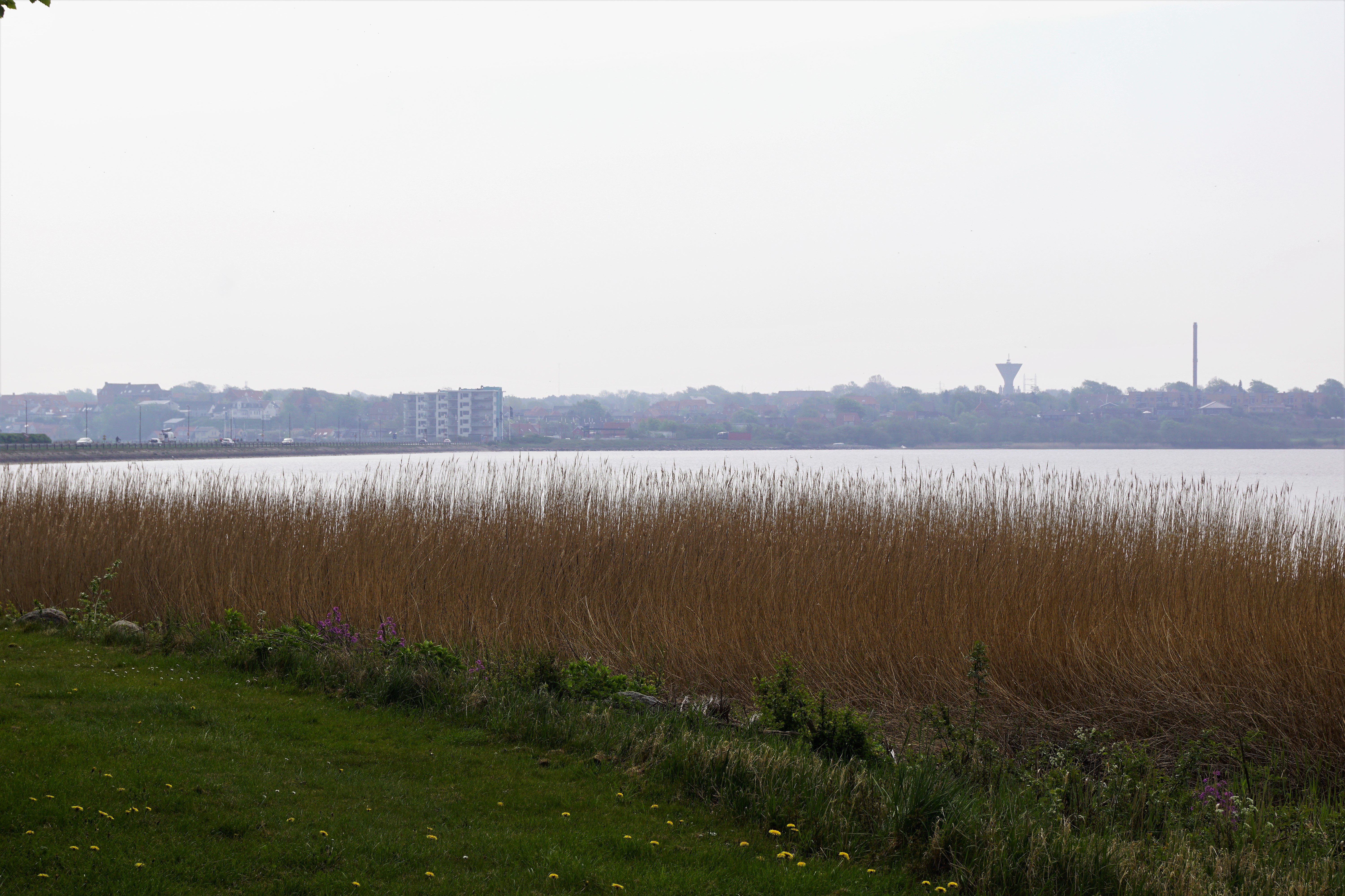 Brakvandssøen Kilen vest for Struer